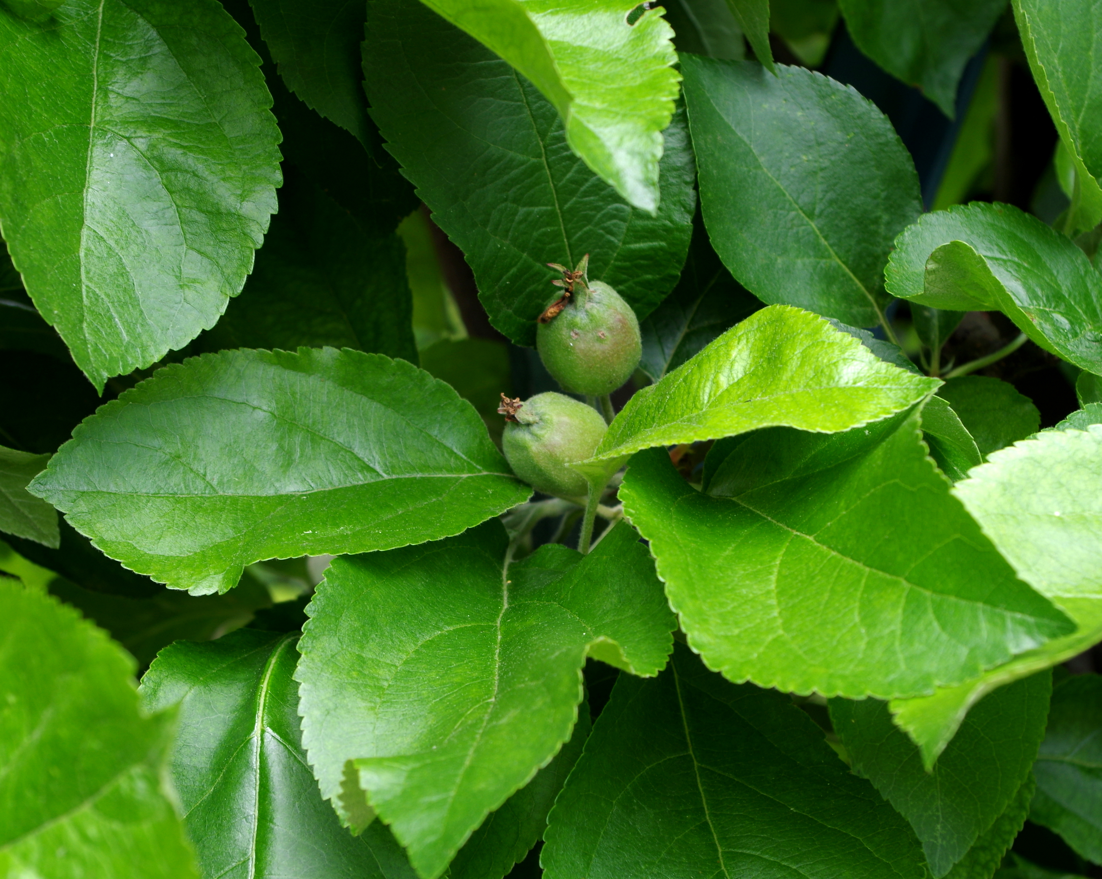 Pommes Delbard Jubilé